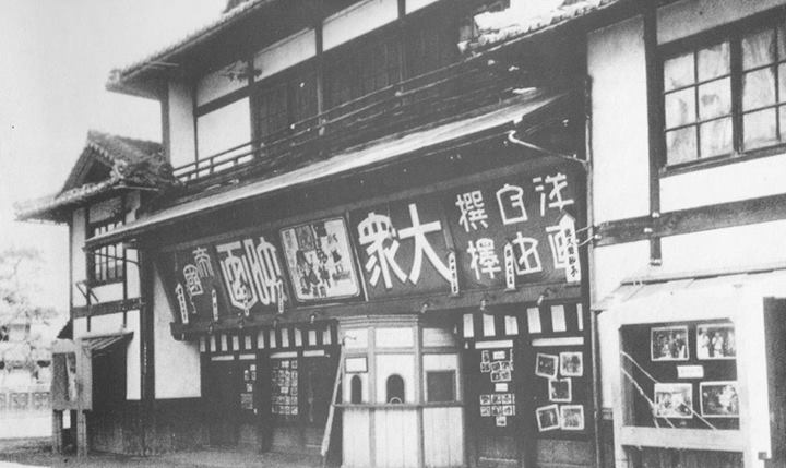 滋賀県犬上郡彦根町（現在の彦根市）の帝國館（のちの彦根協映劇場）、1935年の写真。